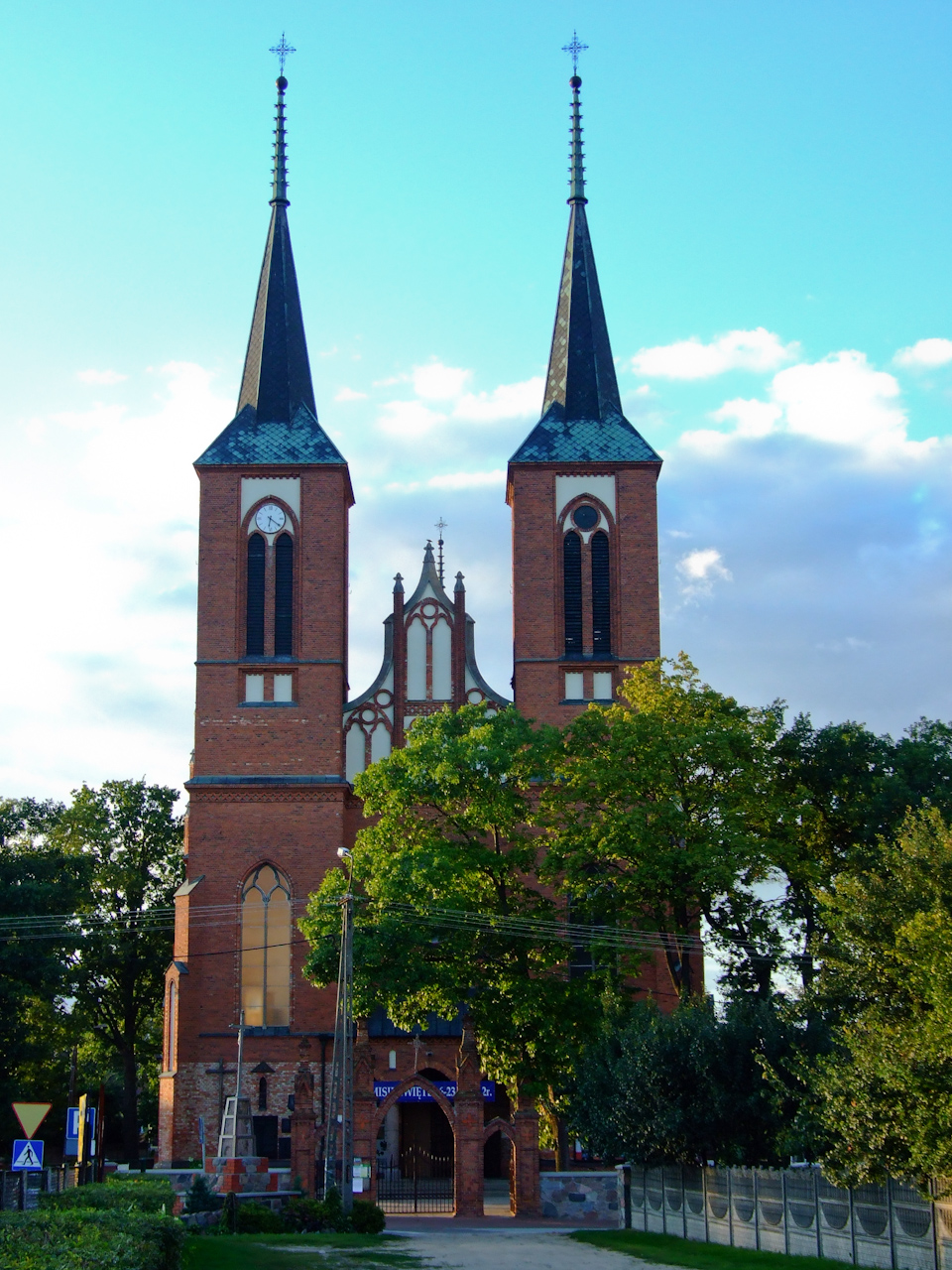 Długosiodło - rzymskokatolicki kościół parafialny p.w. św Rocha, 1908-1912 (widok od frontu).